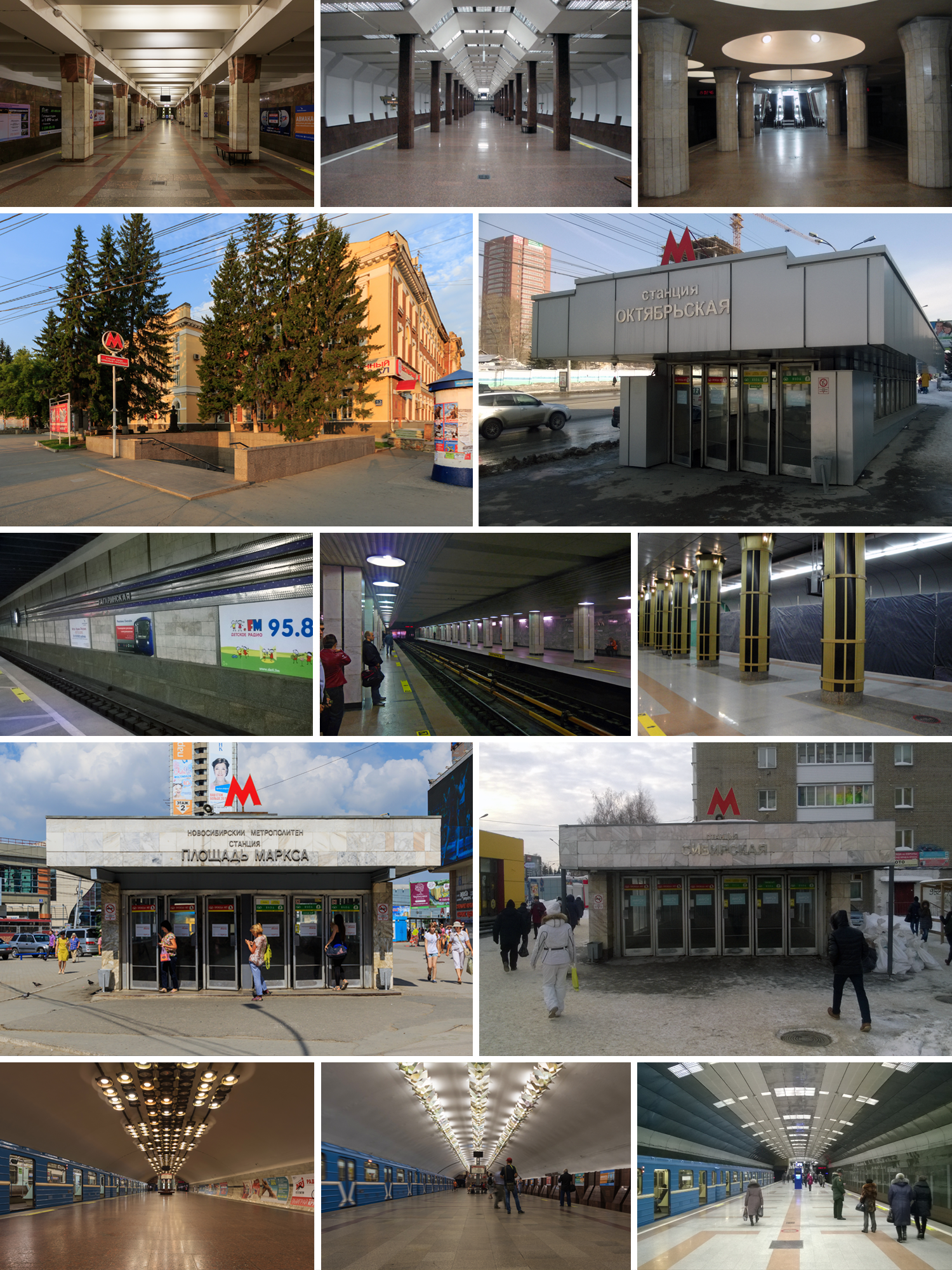 Коллаж из станций Новосибирского метрополитена